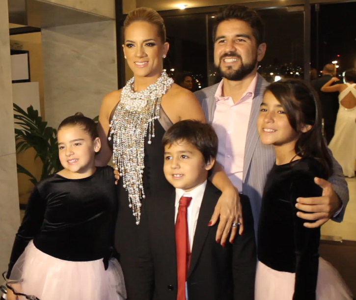 La Familia Bucaram Pazmiño en 2015. Gabriela Pazmiño junto a Dalo Bucaram y sus hijos en la gala de los Premios ITV. Esta imagen es un fragmento de los videos en bruto que conservo de mi programa en YouTube, donde pongo una licencia libre de Gabriela Pazmiño en el video